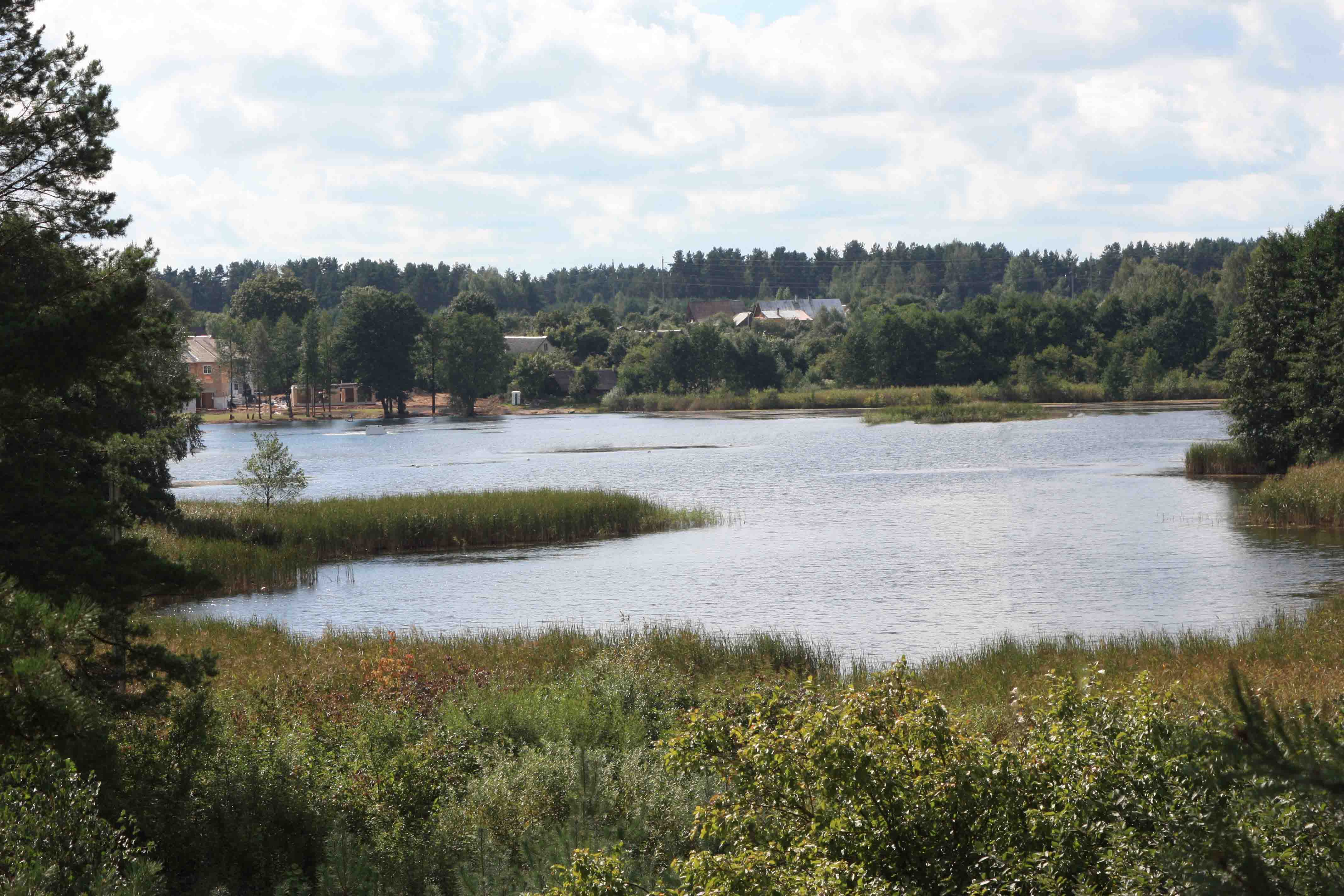 Salotės ežeras, Vilnius.